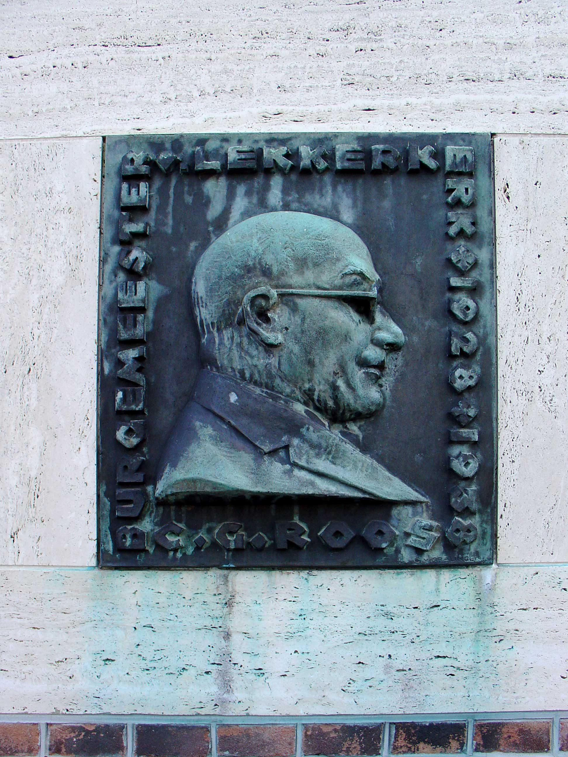 Burgemeester C.G. Roos reliëf door Cor van Kralingen